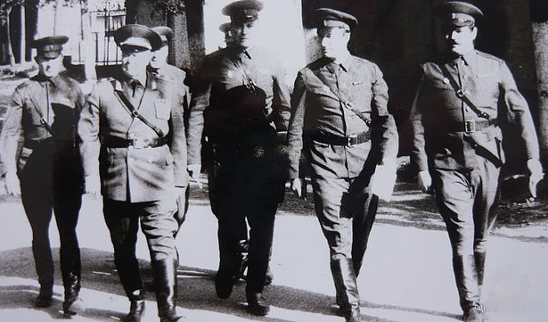 Маршал войск связи А.И. Белов (2-й слева) в 154-м гв. обс 39-й гв. мсд, 1985 г